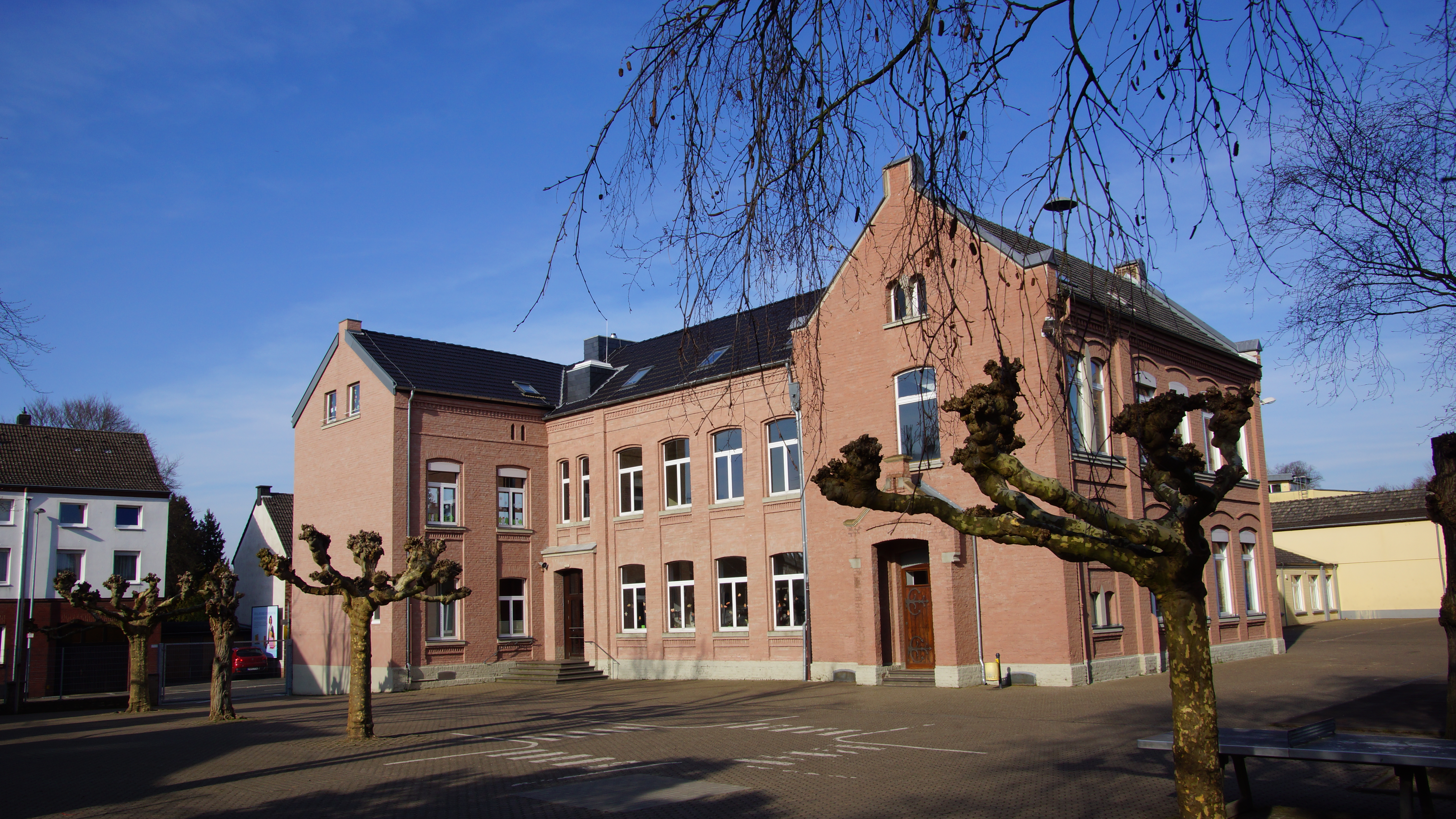 Wilhelm-Busch-Grundschule in Bedburg-Broich, Kölner Straße 35